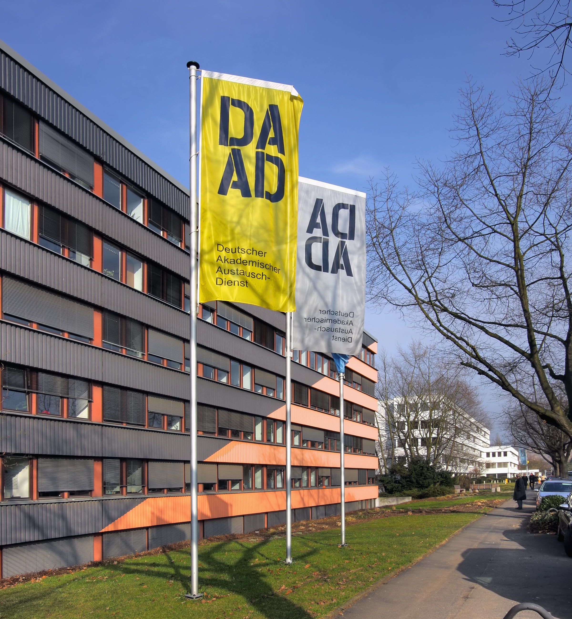 Fahnen vor einem Gebäude des DAAD, Kennedyallee, Bonn